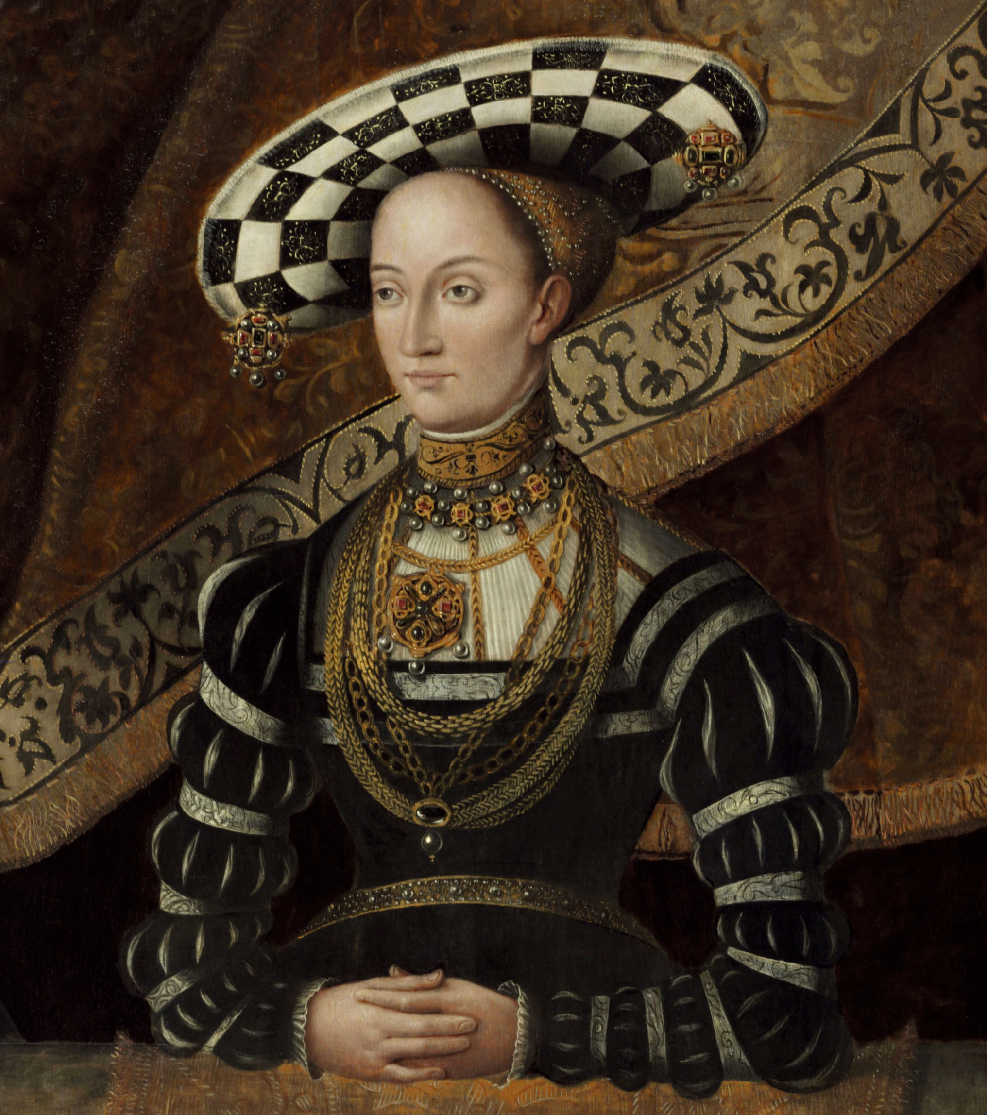 Christine von Sachsen, Landgräfin von Hessen (1505-1549)